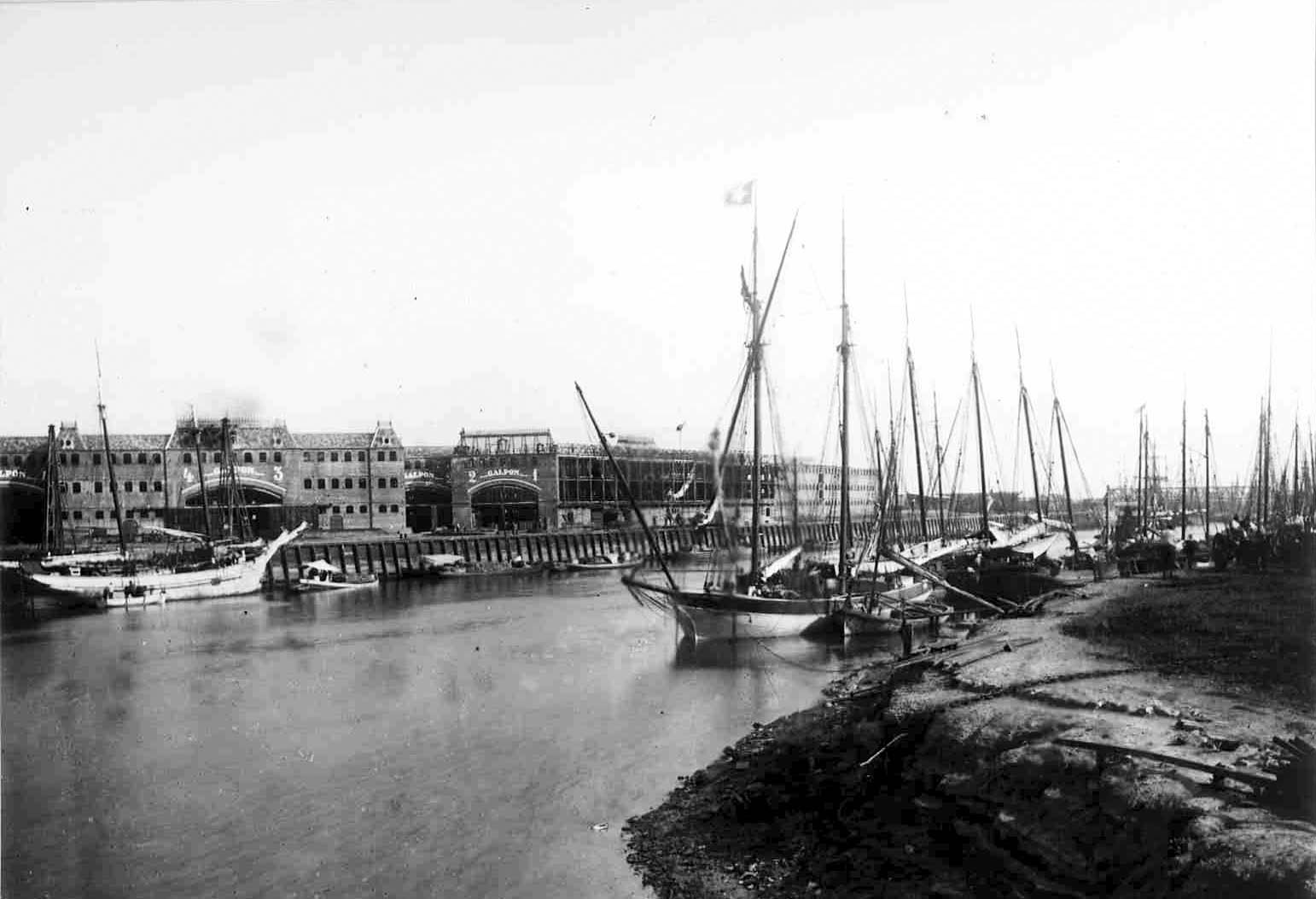 El Mercado Central de Frutos en Avellaneda, Buenos Aires, en construcción y visto desde el Riachuelo.